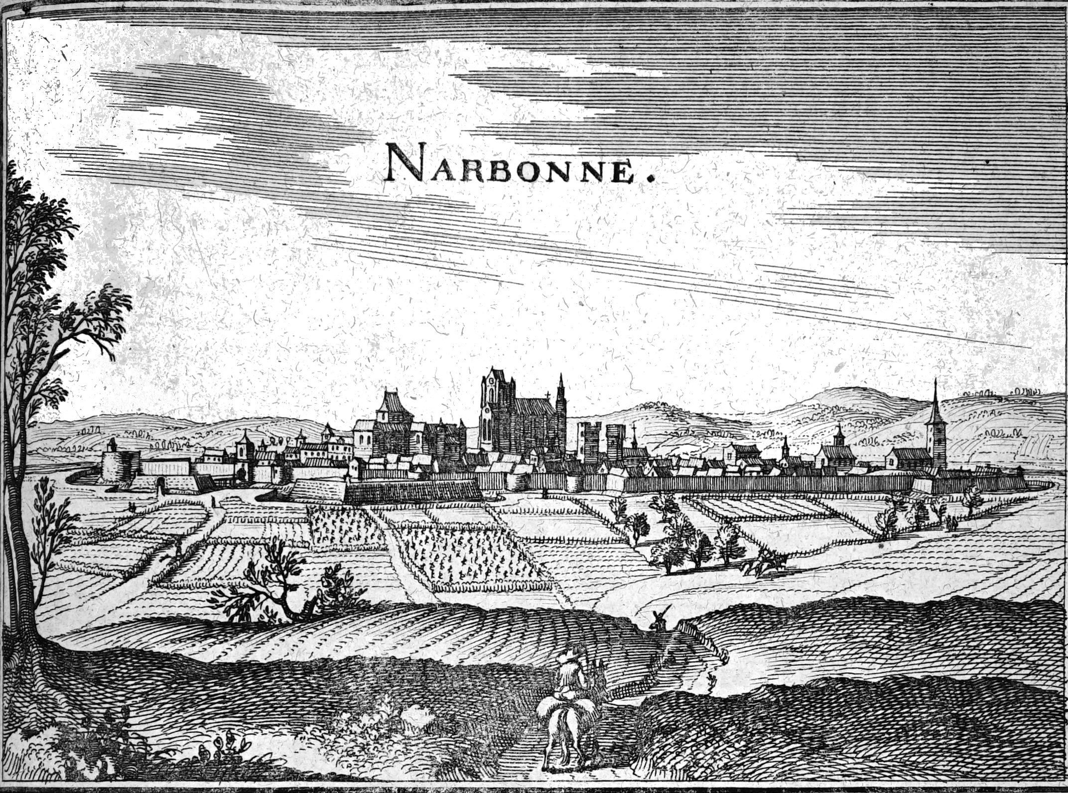 présenté dans Topographiae Gallaie.